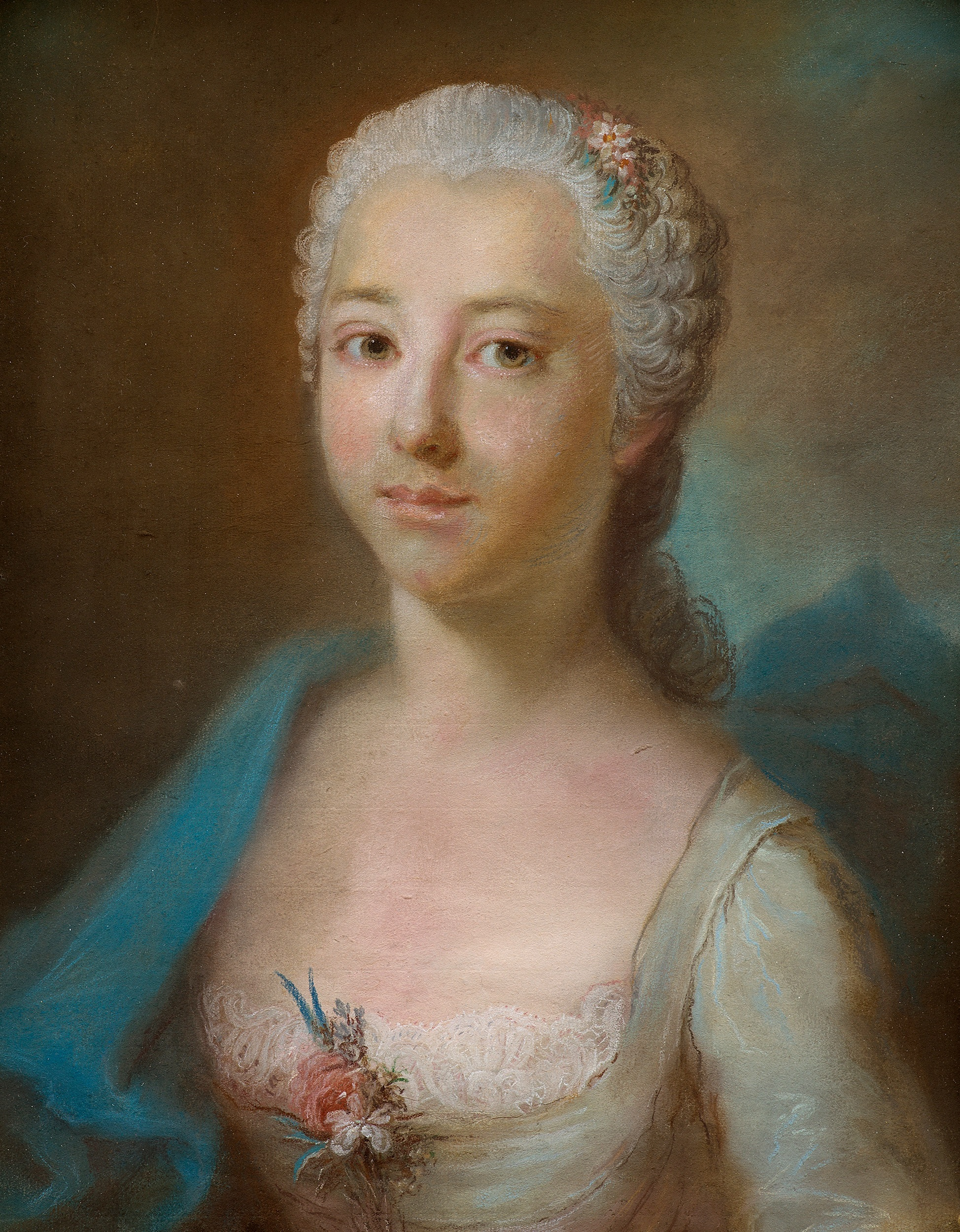 Izabela z Flemingów Czartoryska (1746-1835)